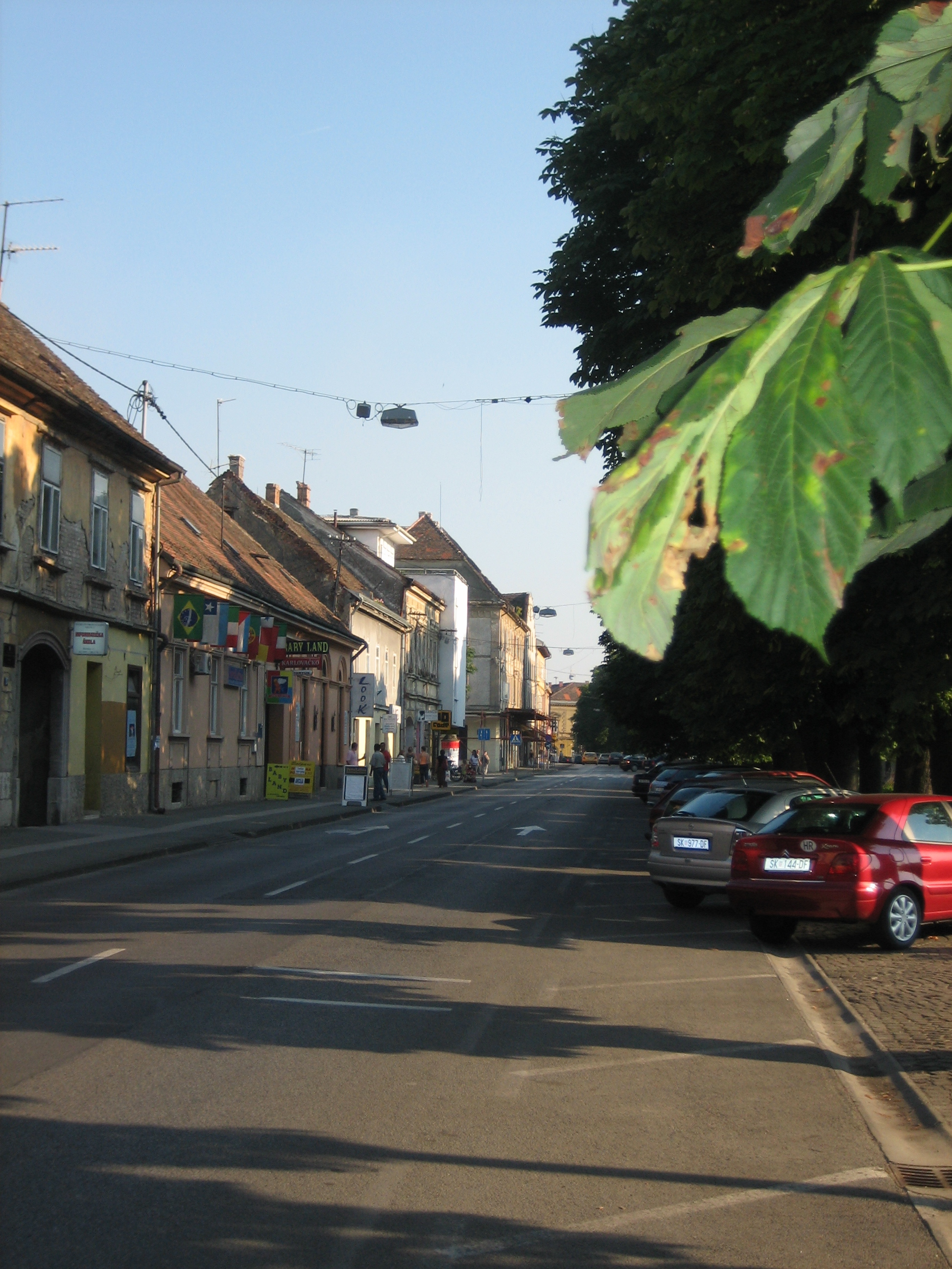 The 1st street in Sisak, Croatia. / Sisačka „Prva ulica“.